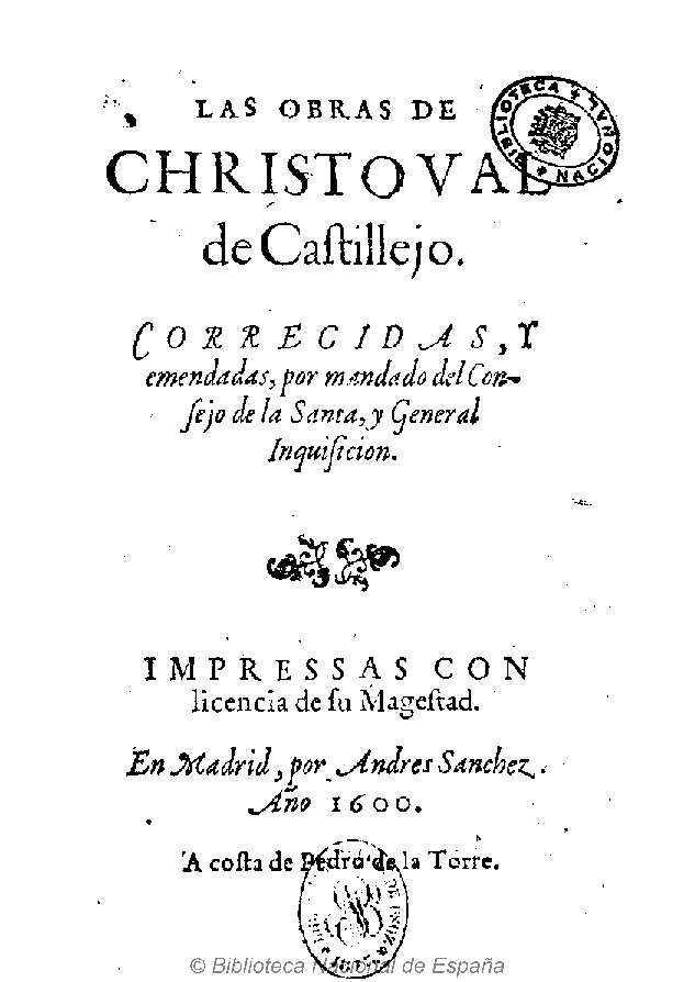 Las obras de Christoual de Castillejo corregidas, y emendadas, por mandado del Consejo de la Santa, y General Inquisicion Autor: Castillejo, Cristóbal de (1494-1550) Fecha: 1600 Datos de edición: En Madrid por Andres Sanchez a costa de Pedro de la Torre